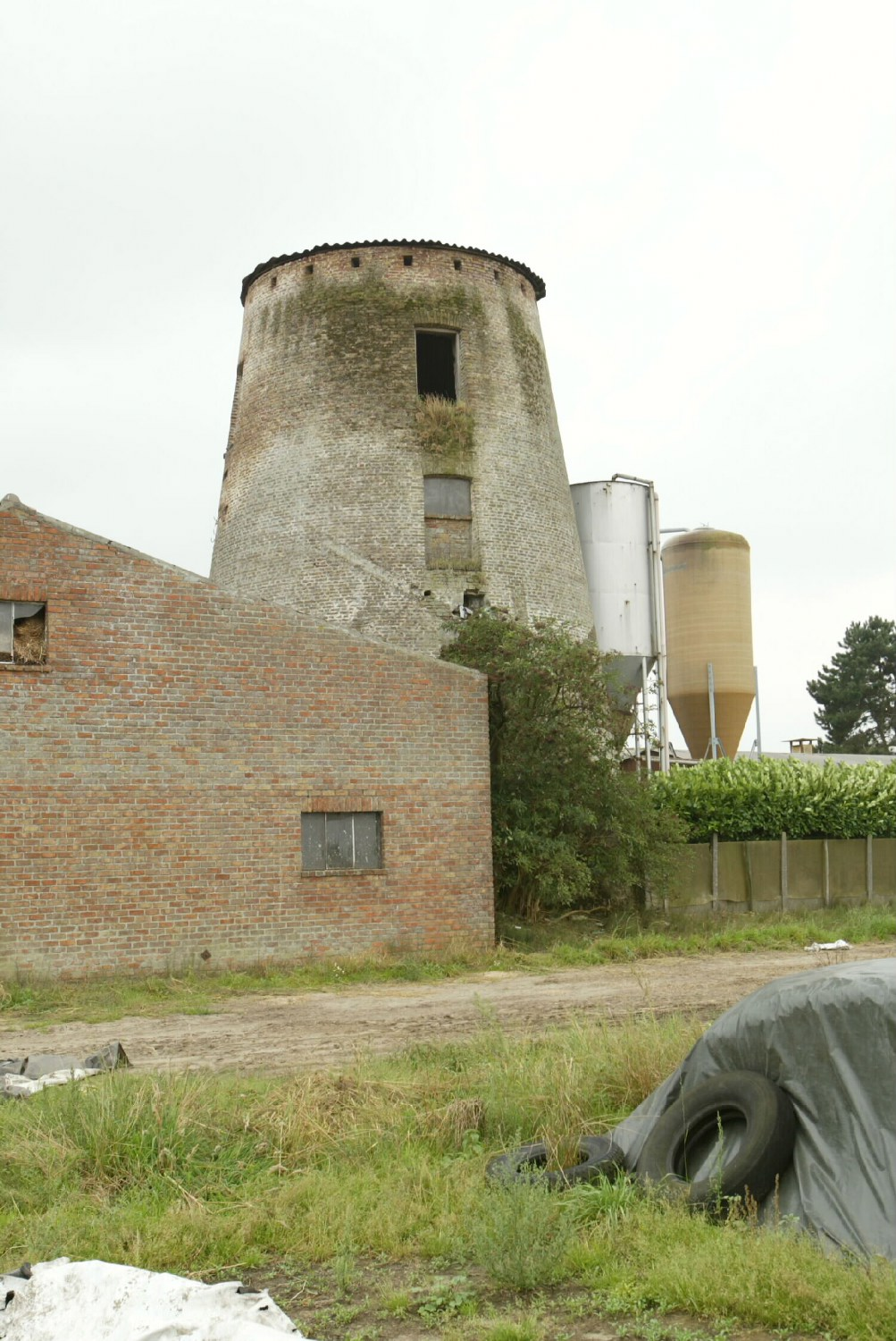 Oudenburg, Westkerke, Noordstraat 1